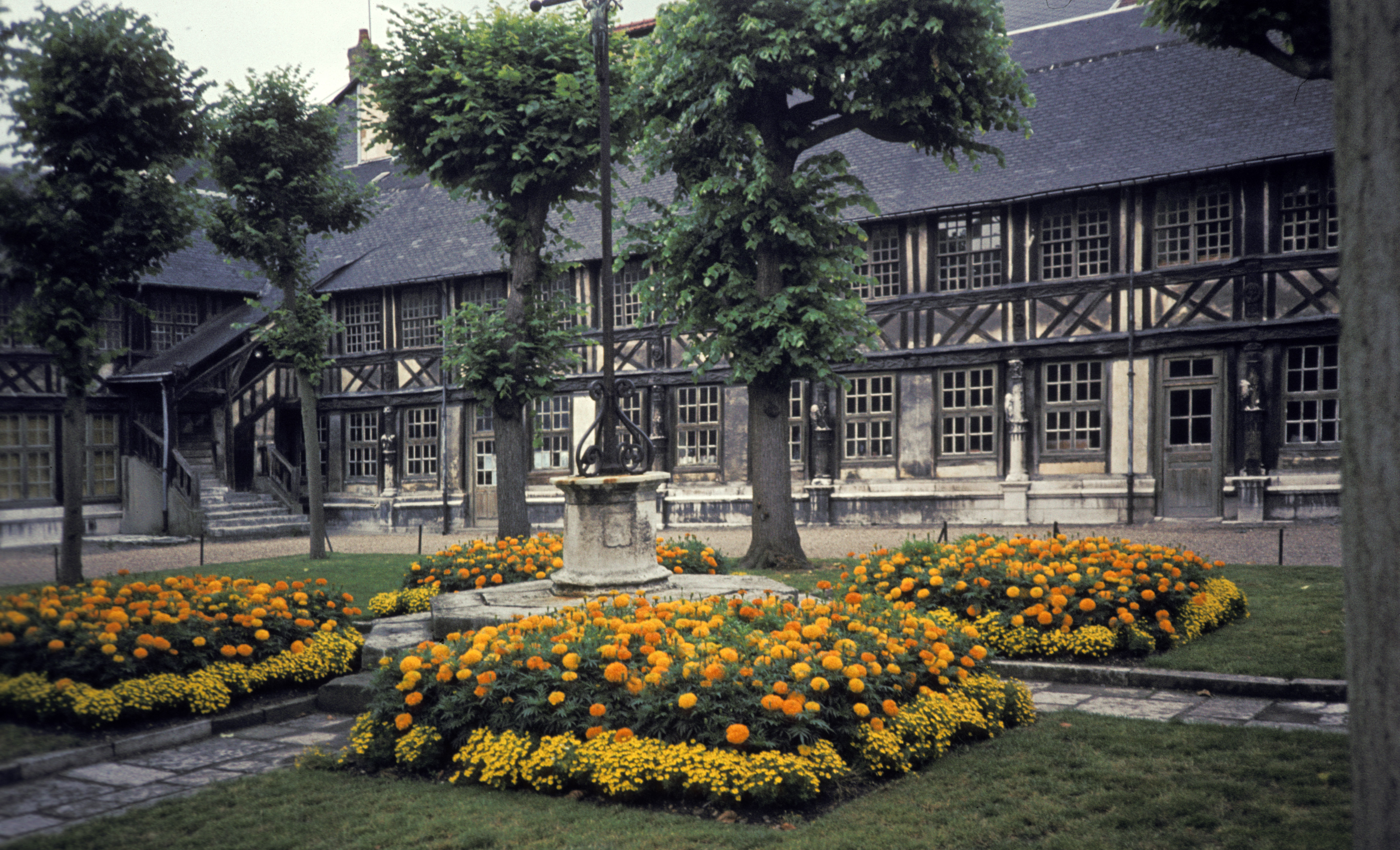 Aître Saint-Maclou, Rouen, Haute-Normandie.